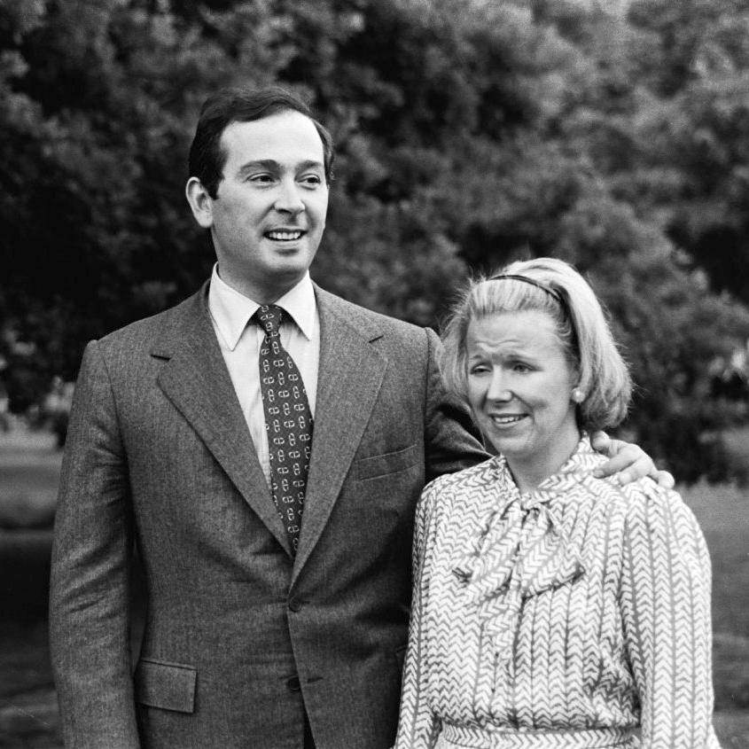 Defile Soestdijk, laatste; tijdens wandeling over het middenterrein; Prinses Christina en Jorge Guillermo.